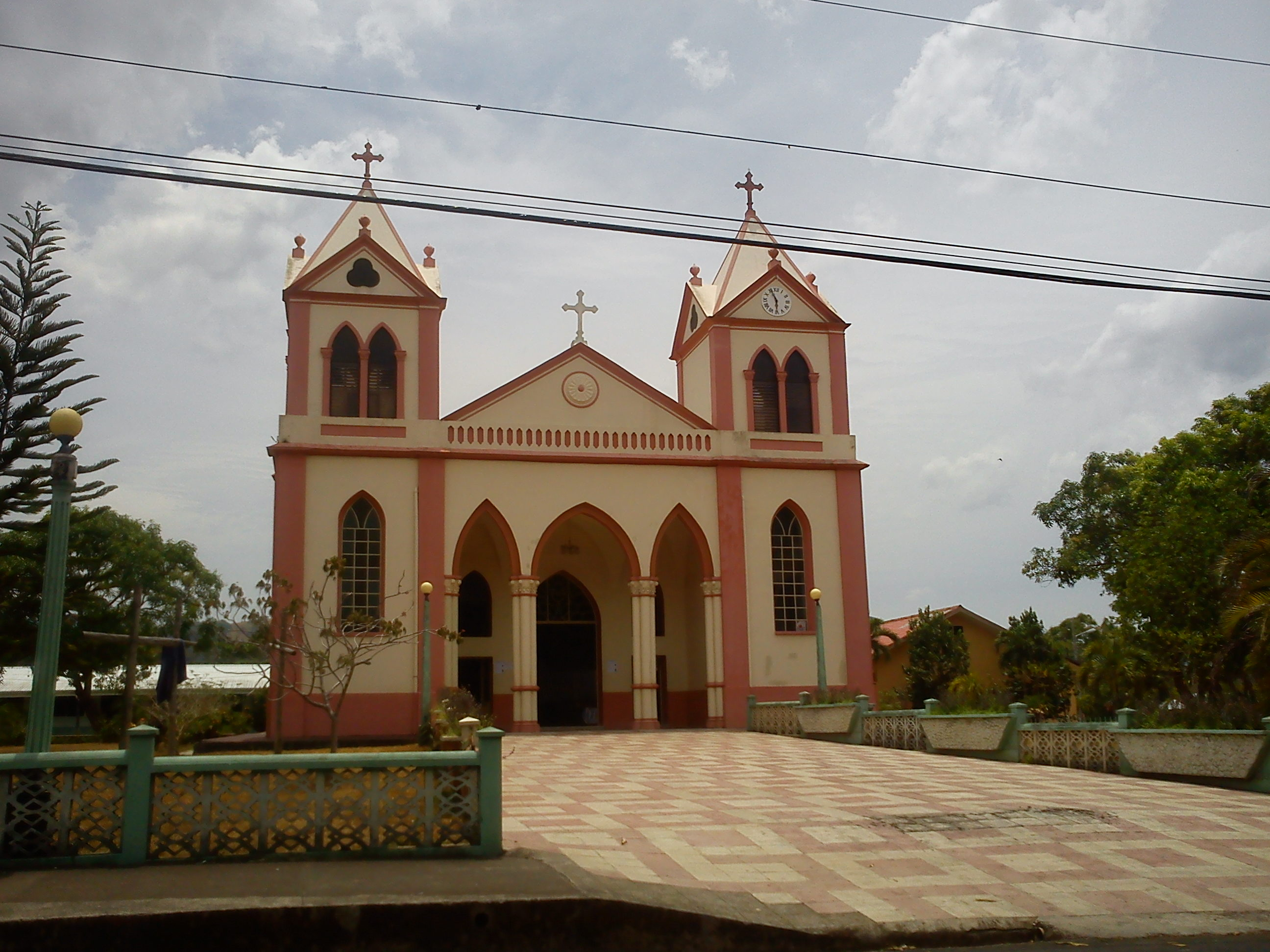 Iglesia del cantón de San Mateo, en Costa Rica.